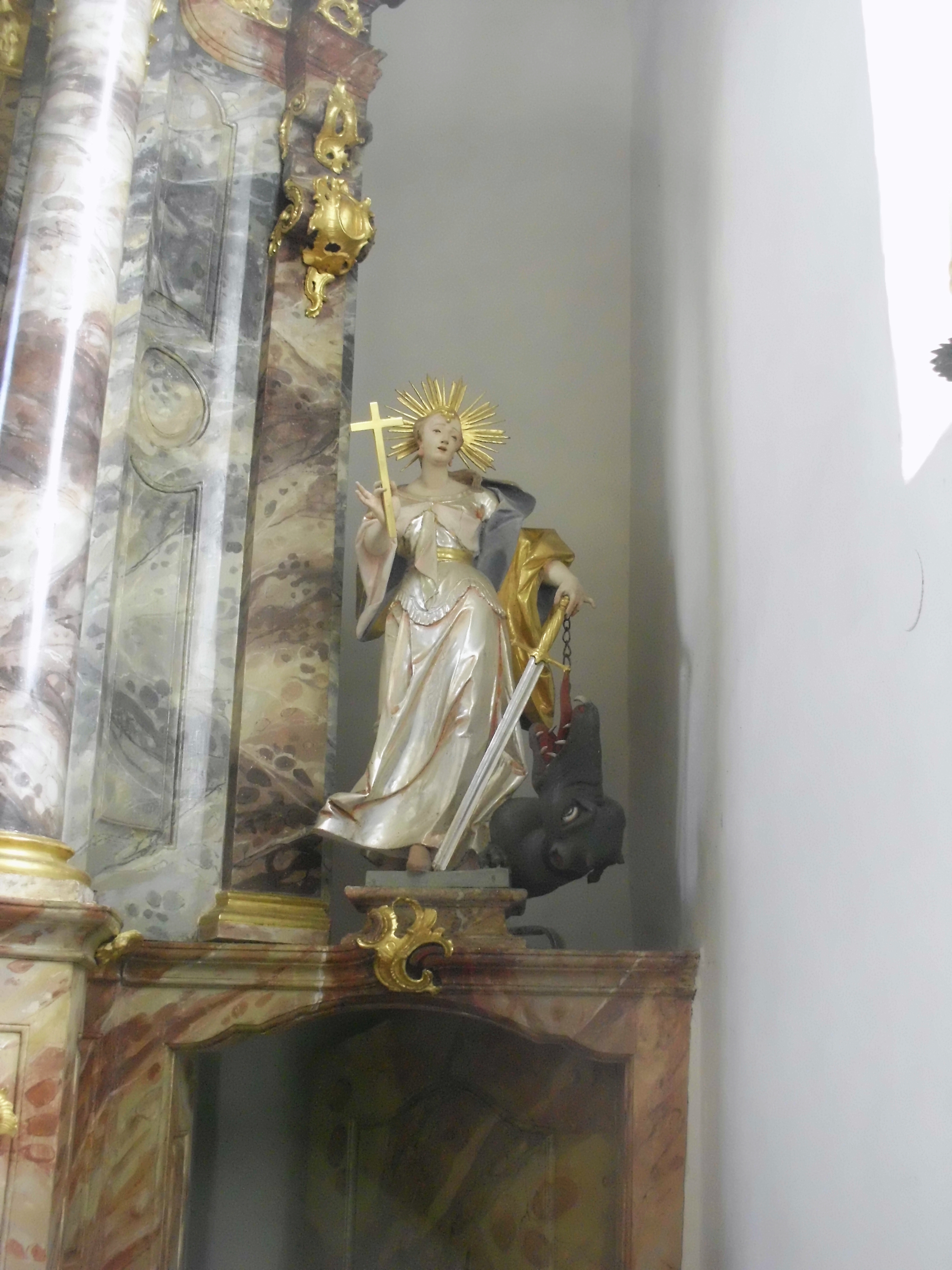 Warching, Landkreis Donau-Ries, Kirche St. Nikolaus, Statue der hl. Margareth von Philipp Jakob Rämpl